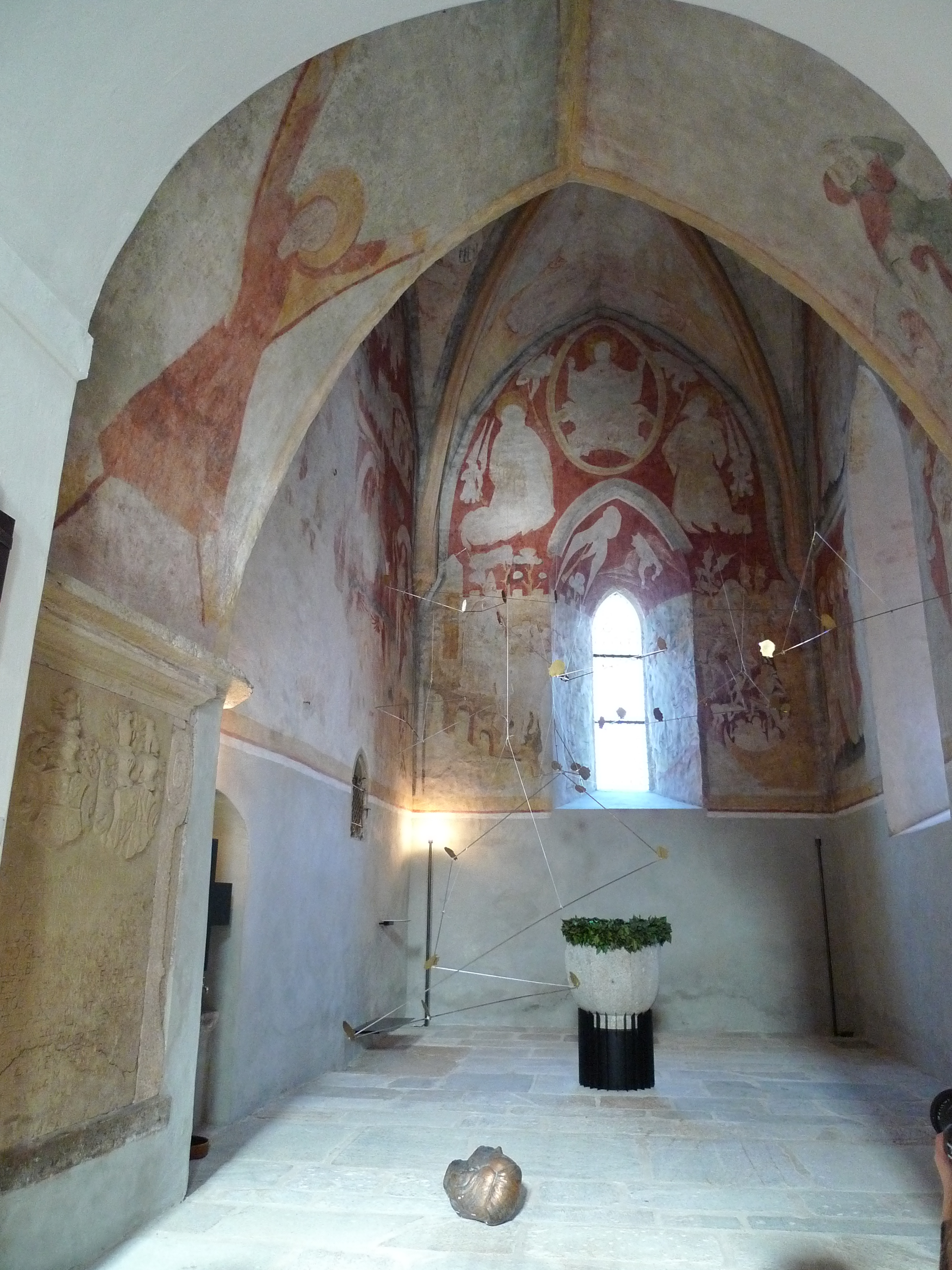 Kath. Pfarrkirche hl. Andreas und Kirchhof